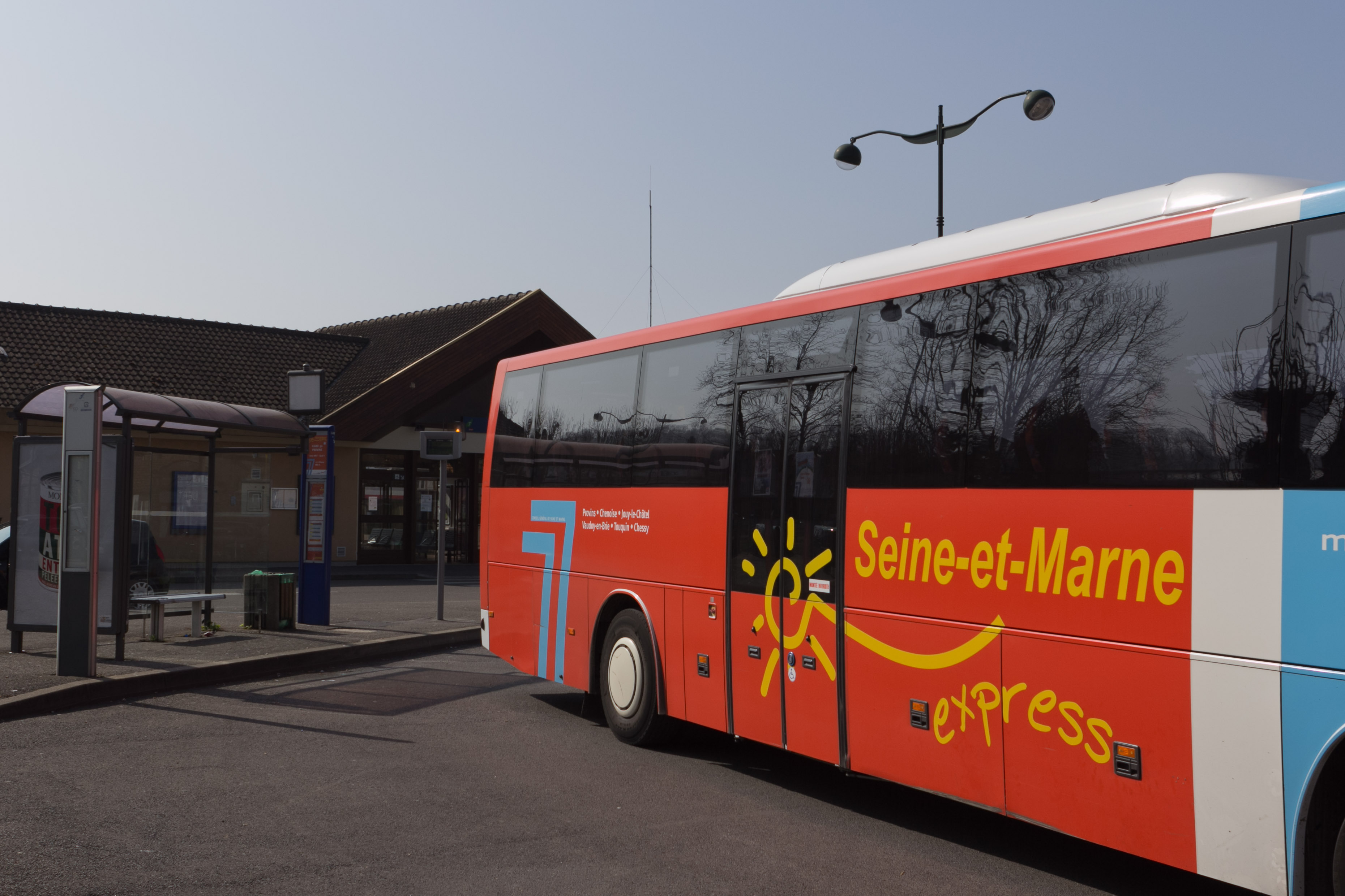 Gare routière de Provins, Provins, département de Seine-et-Marne, France